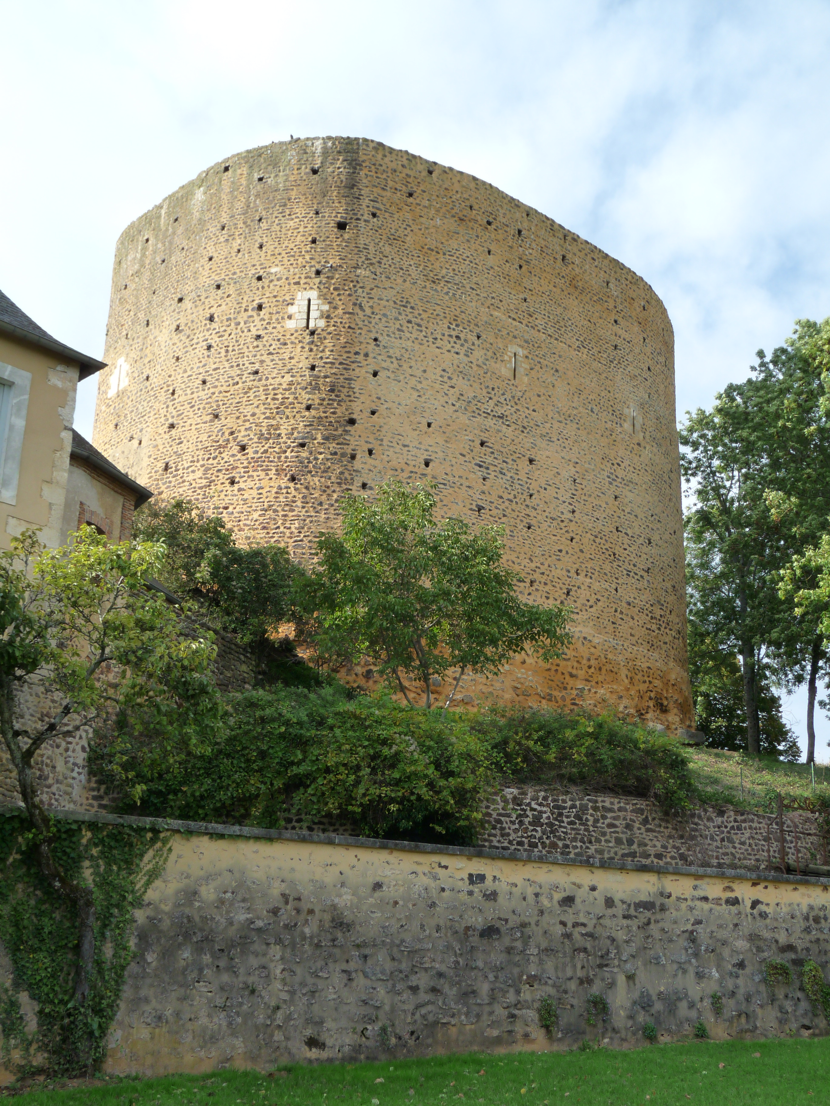 le donjon du château de st Sauveur en Puisaye, département de l'Yonne